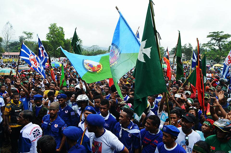 Wahlkampfveranstaltung in Gleno von António da Conceição. Im Publikum werden Flaggen der Parteien PLP, KHUNTO und PD geschwenkt. Dazu auch Nationalflaggen Osttimors.